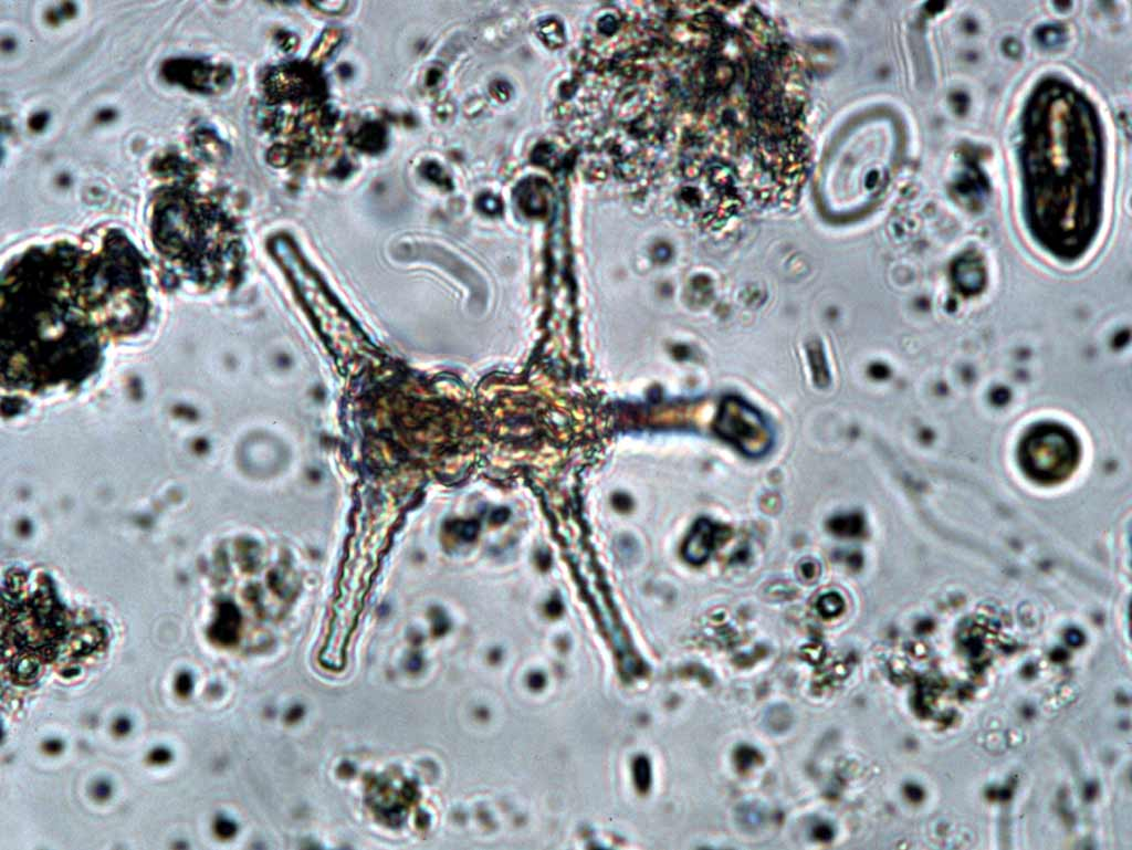 Staurastrum paradoxum